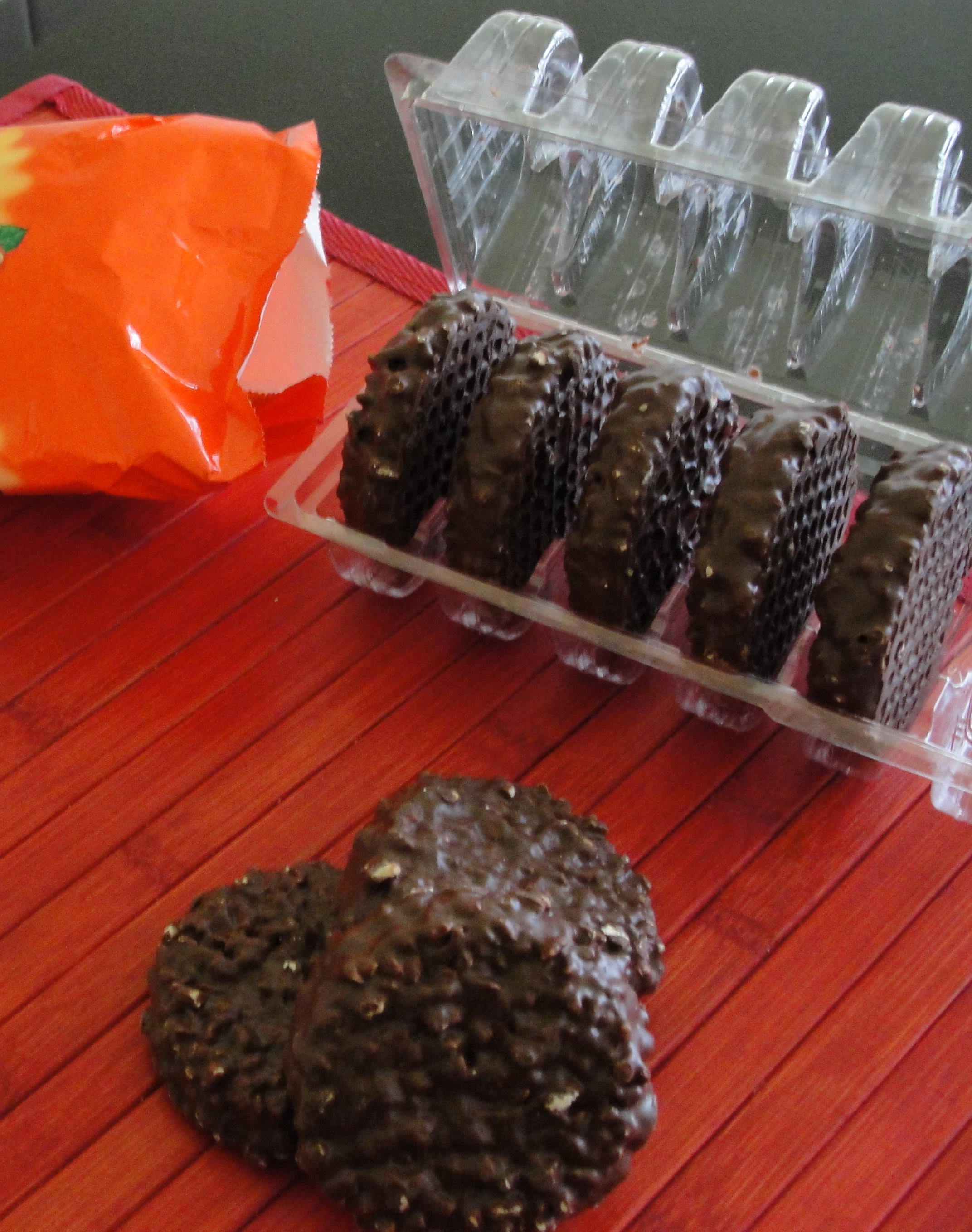 Douceurs turques.